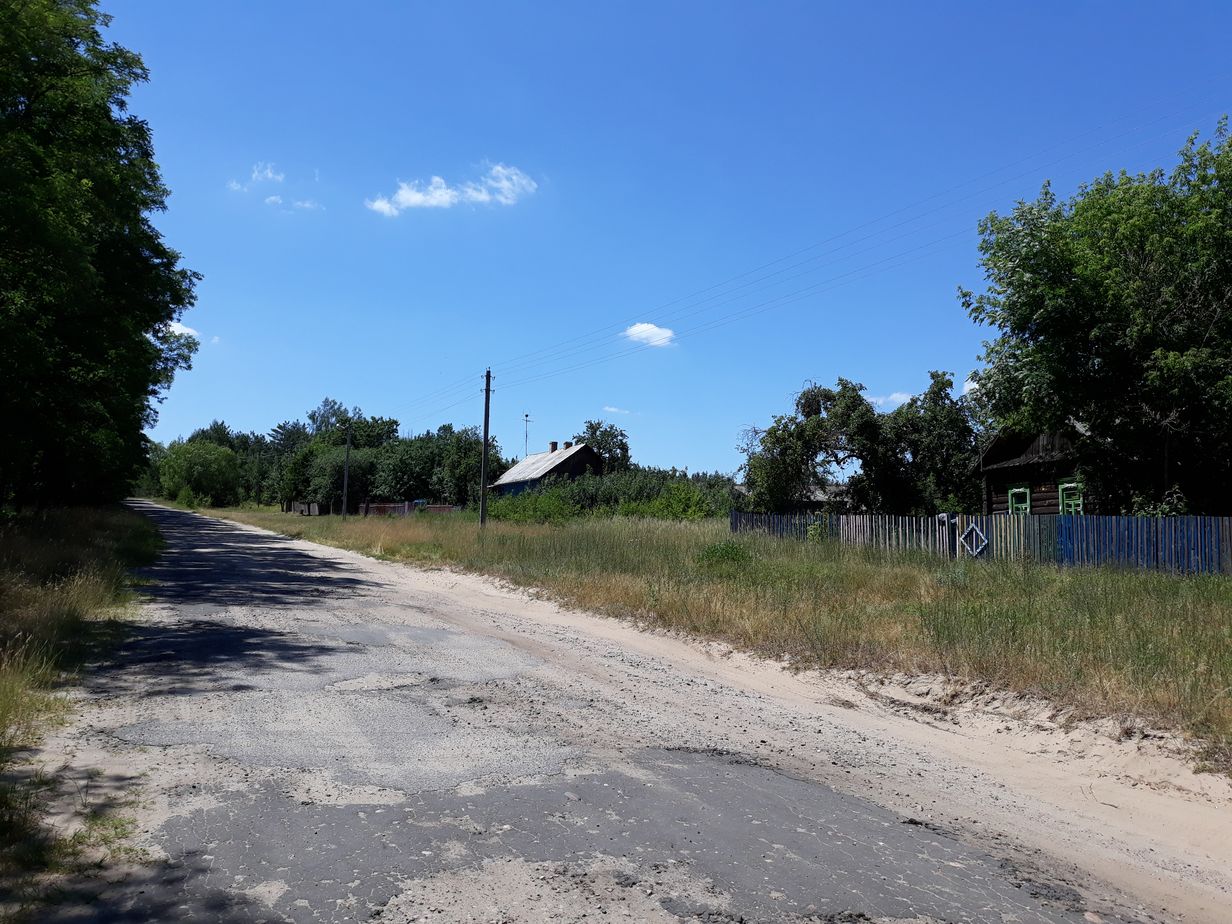 Давыдаўка. Светлагорскі раён. Краявіды